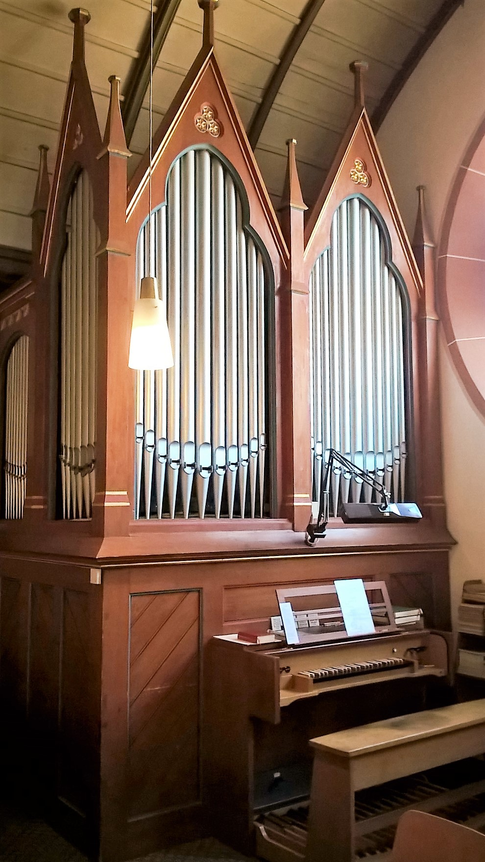 Evangelische Kirche Fellingshausen, Biebertal, Landkreis Gießen, Hessen, Deutschland